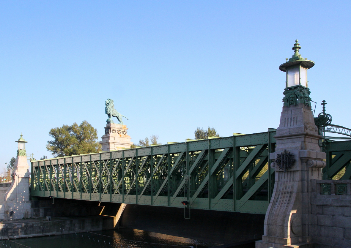 Die Schemerlbrücke der Nussdorfer Wehr- und Schleusenanlage in Wien.